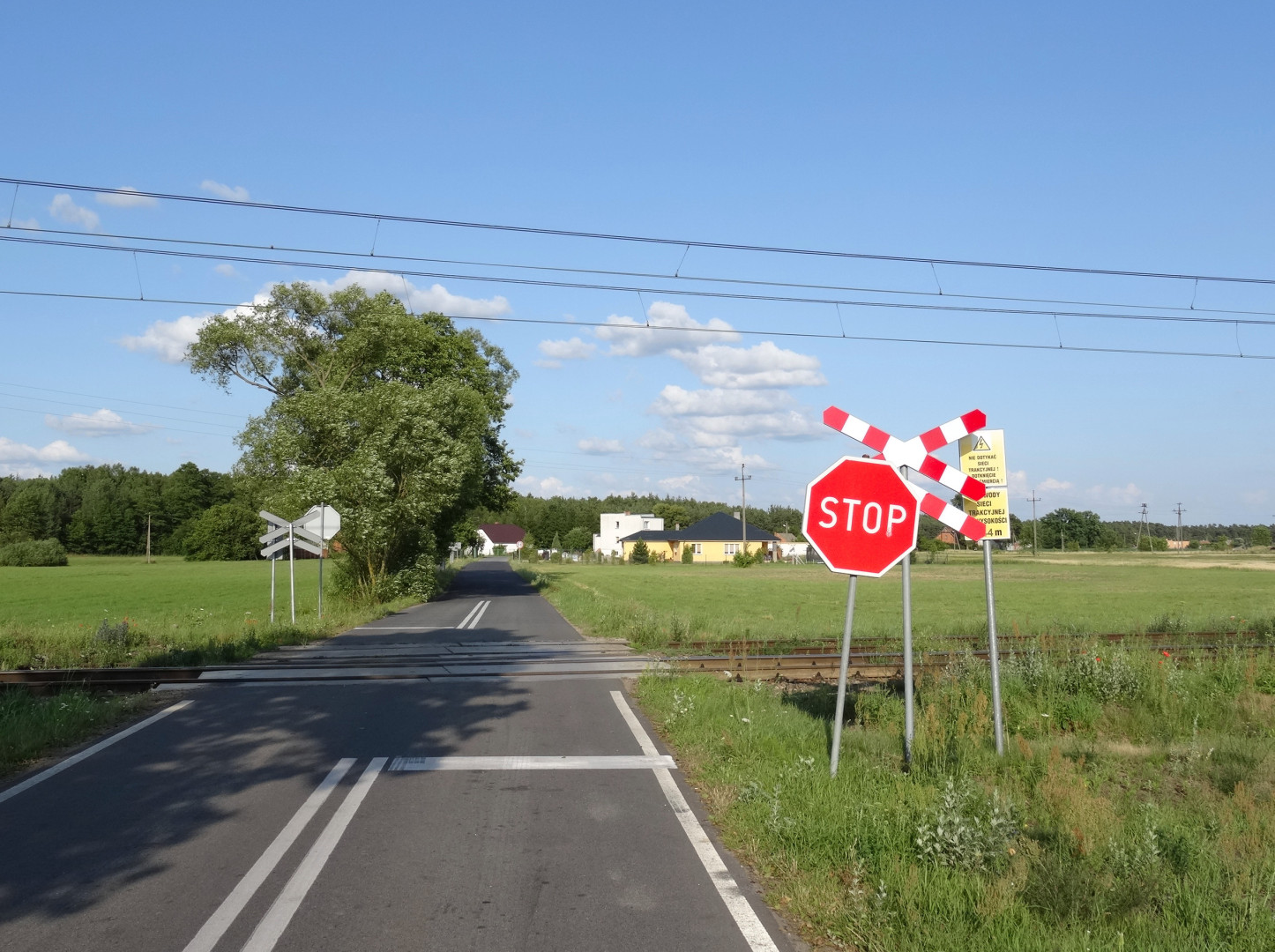 Dobromierz, gmina Nowa Wieś Wielka, powiat bydgoski. Przejazd przez magistralę węglową